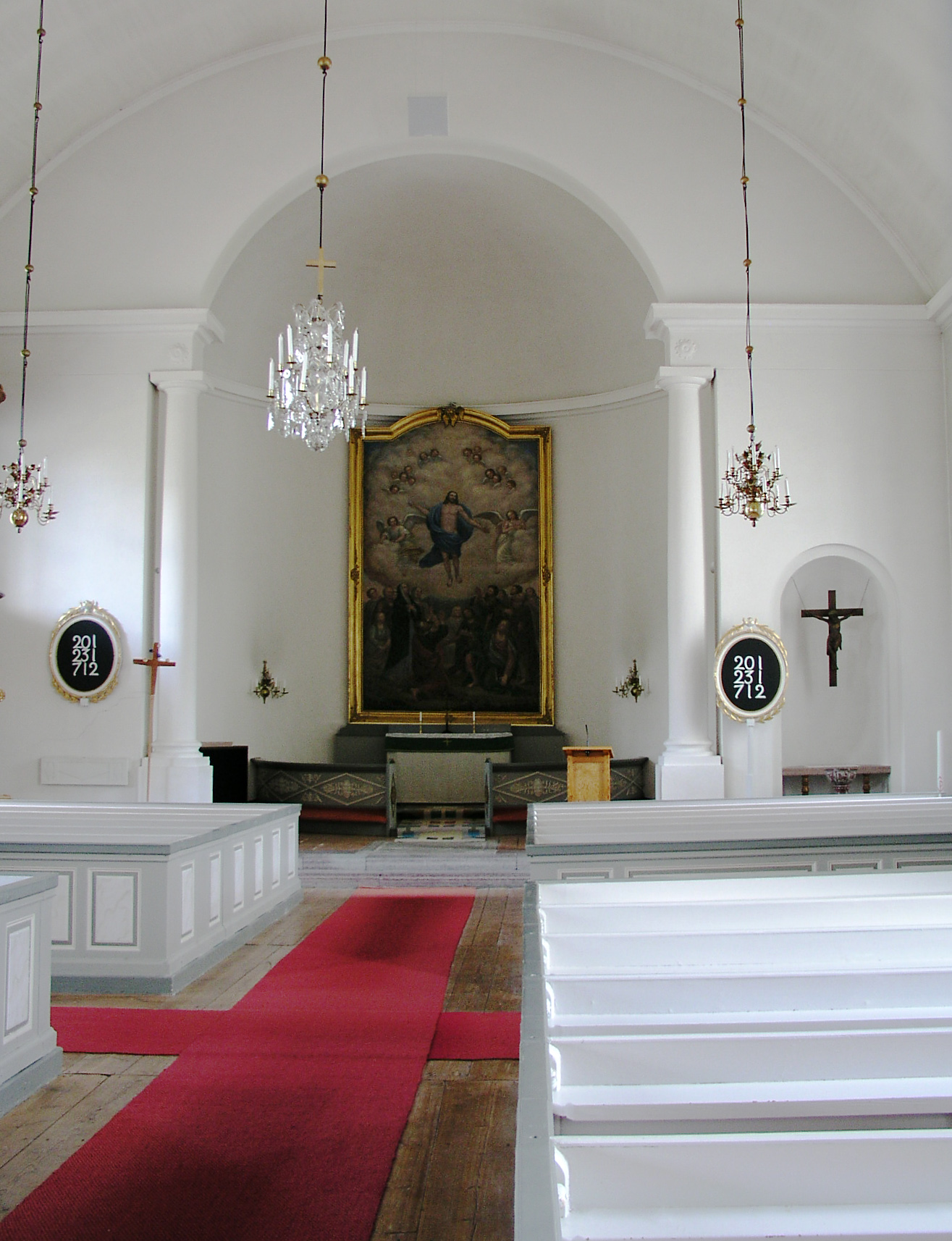 Västra Tollstads kyrka, Ödeshög, Linköpings stift, Östergötland, Sverige. Kyrksal och altare.